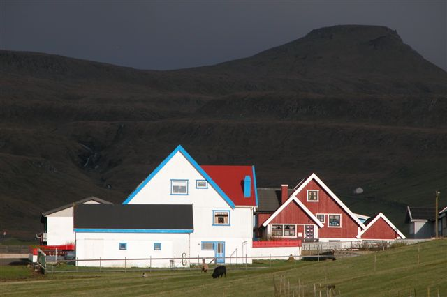 Faroese houses in Porkeri